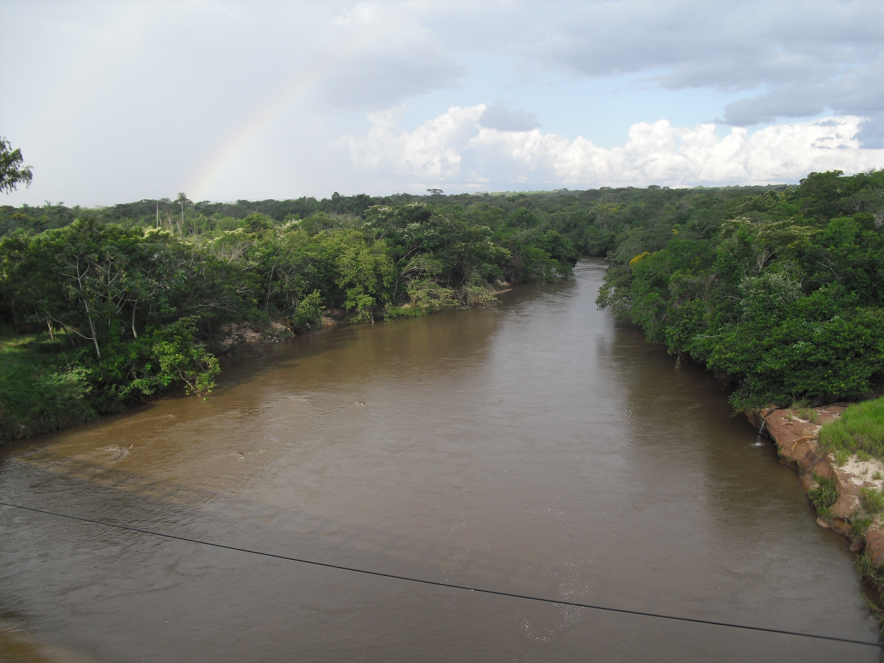 Rio Ypané